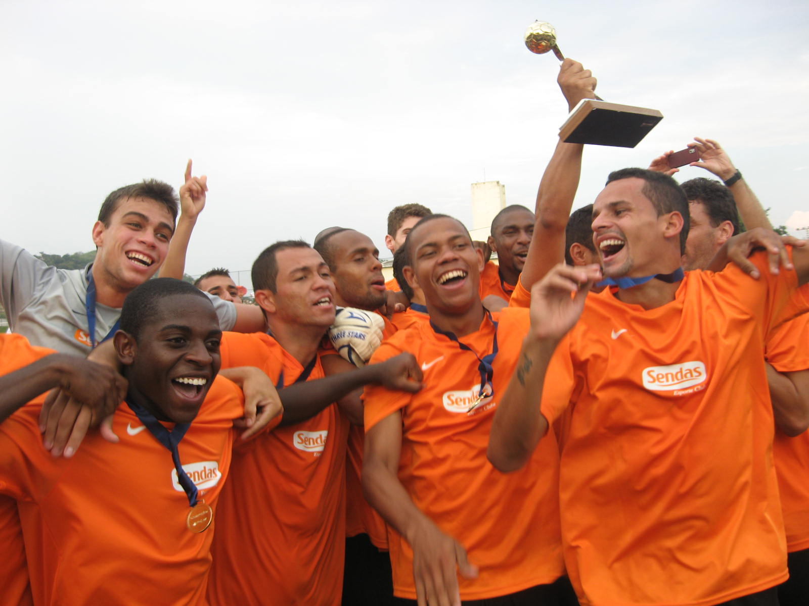 Jogadores do Sendas EC comemorando o título da Copa Rio 2010.